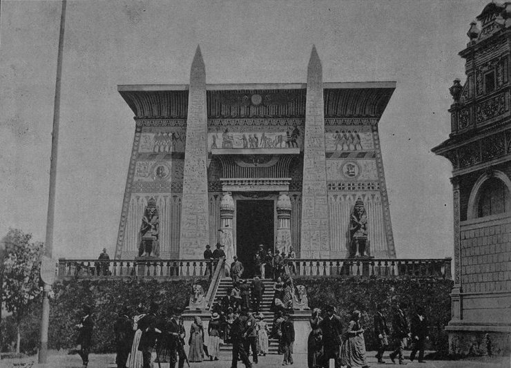 Pavilón českých papírníkův. Jubilejní výstava v Praze 1891.